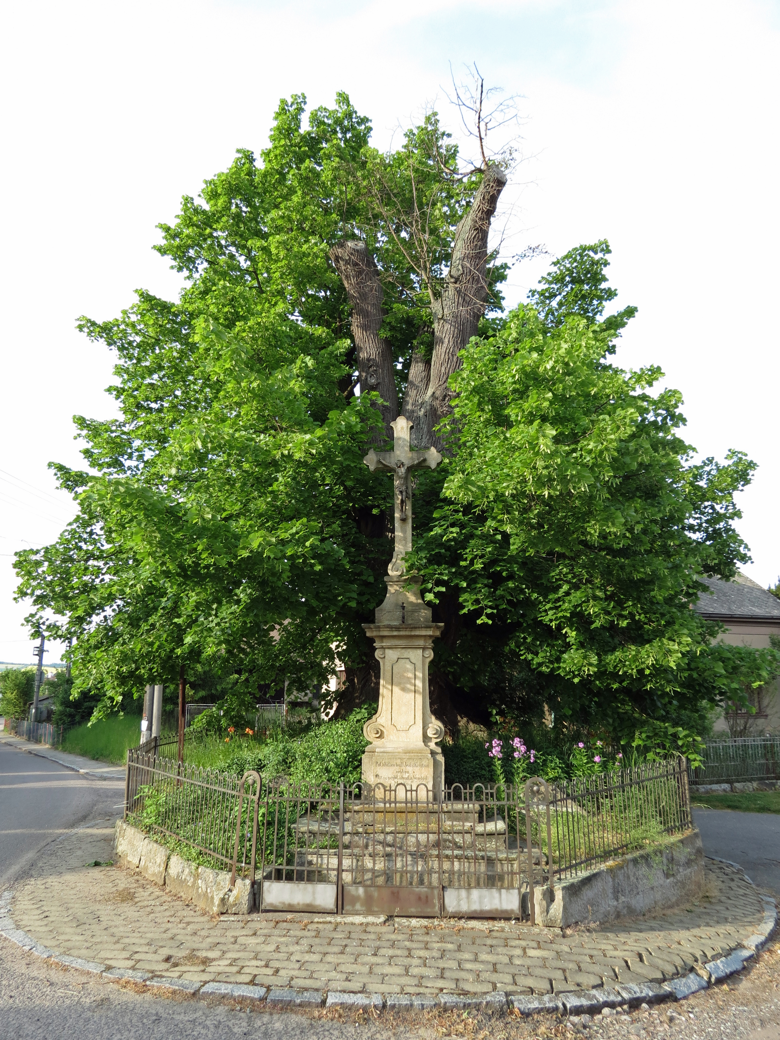 Hněvčeveská lípa